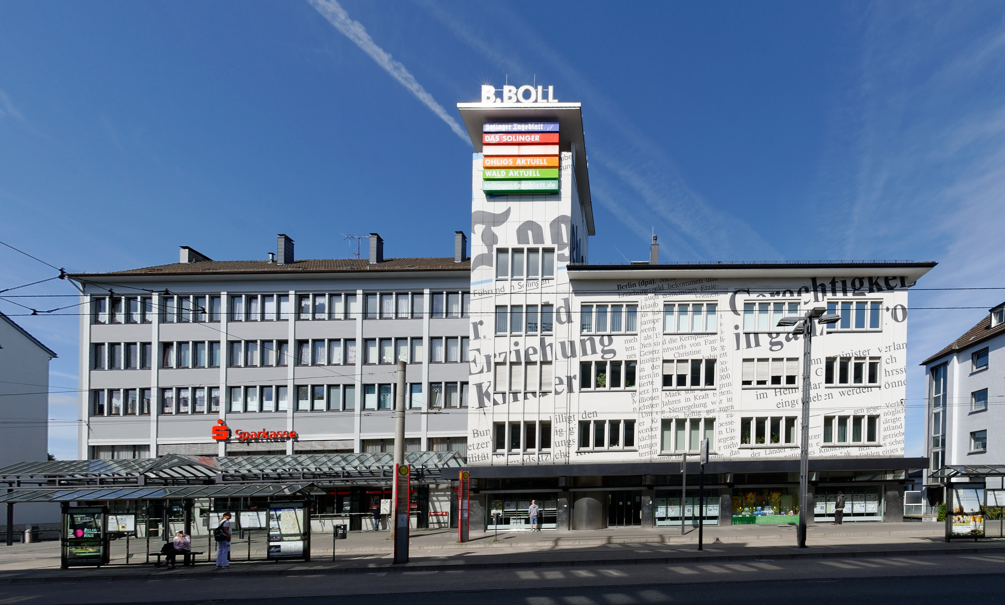 Gebäude des Solinger Tageblatts